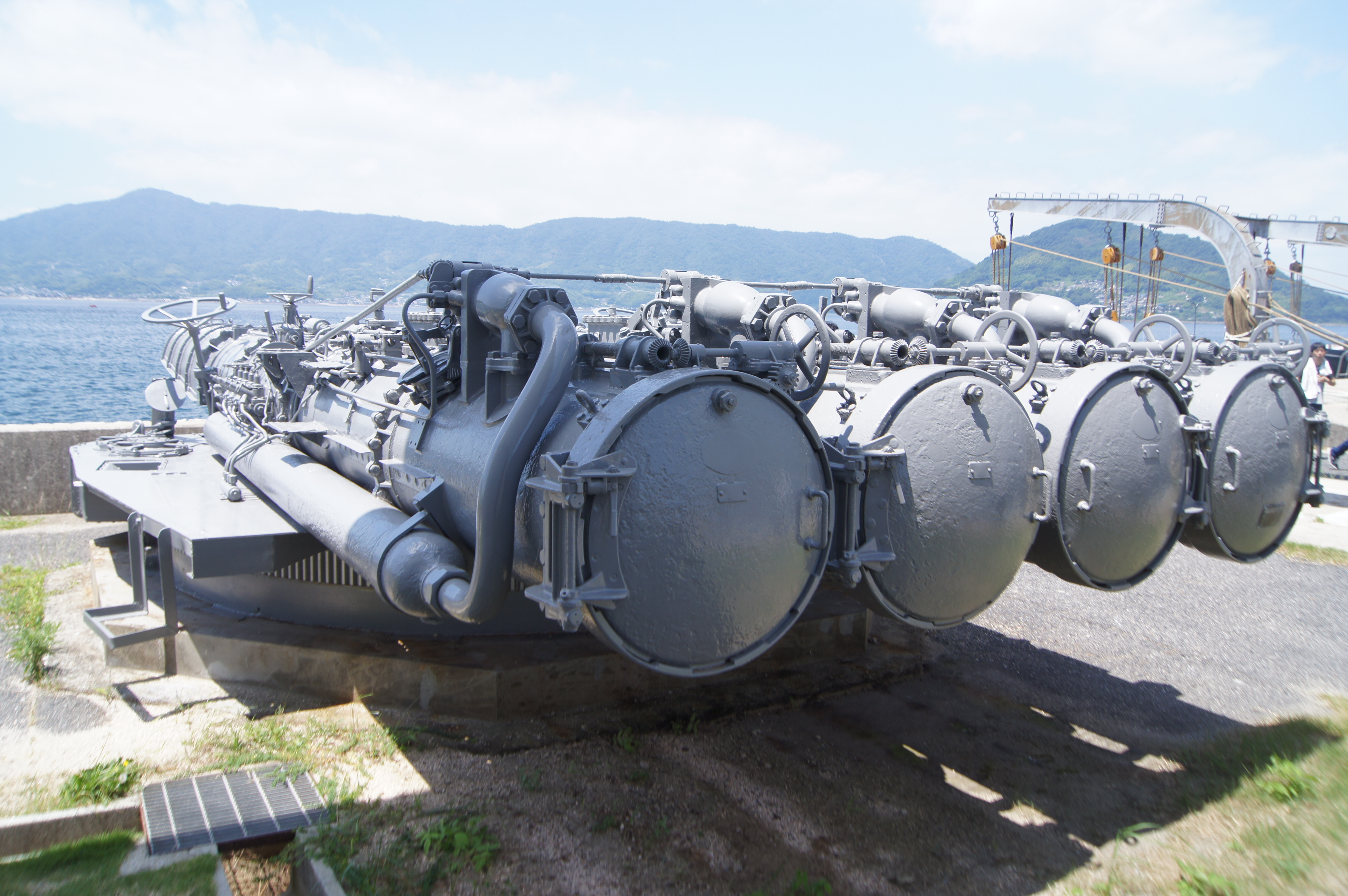 駆逐艦梨に搭載されていた92式ja:魚雷発射管。海軍兵学校 (日本)似て撮影。